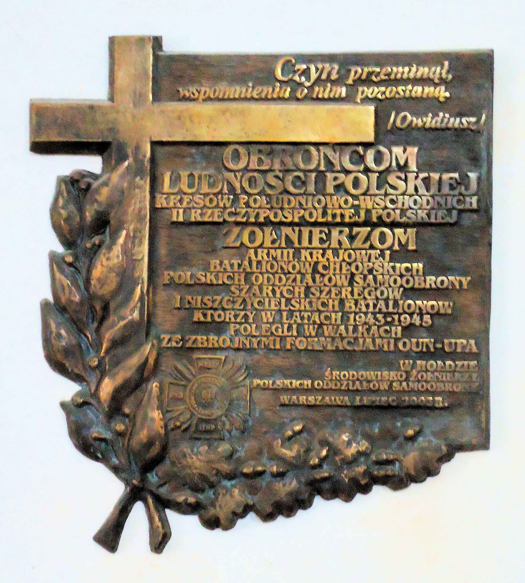 Tablica pamiątkowa "Obrońcom ludności polskiej kresów...." umieszczona w kościele św. Jacka na ul. Freta w Warszawie